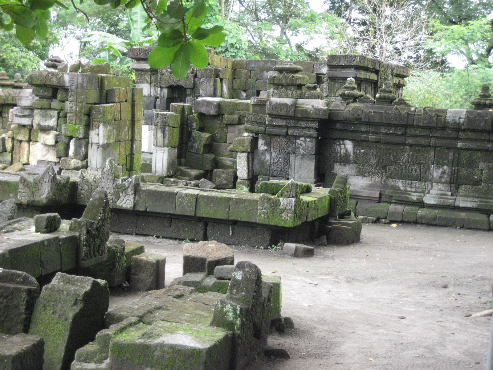 Candi Kedulan Hindu temple in Yogyakarta, central Java, Indonesia